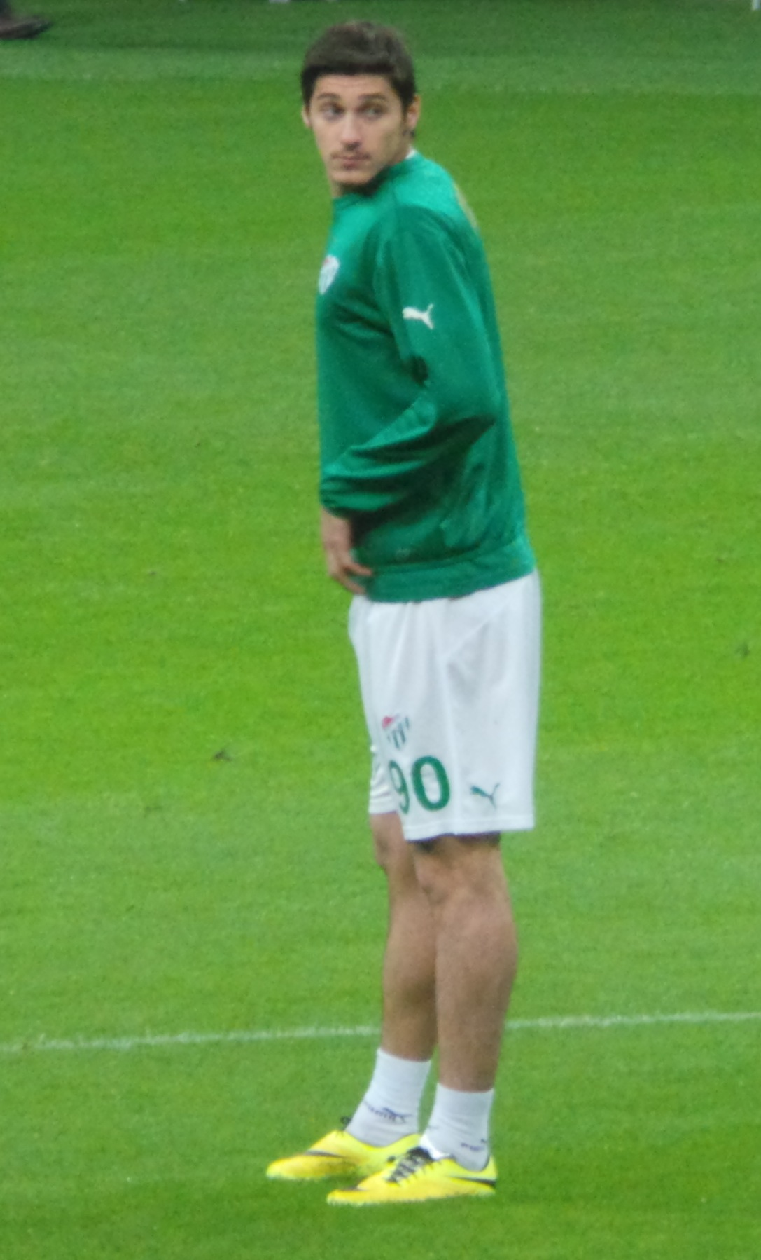 Batuhan Altıntaş